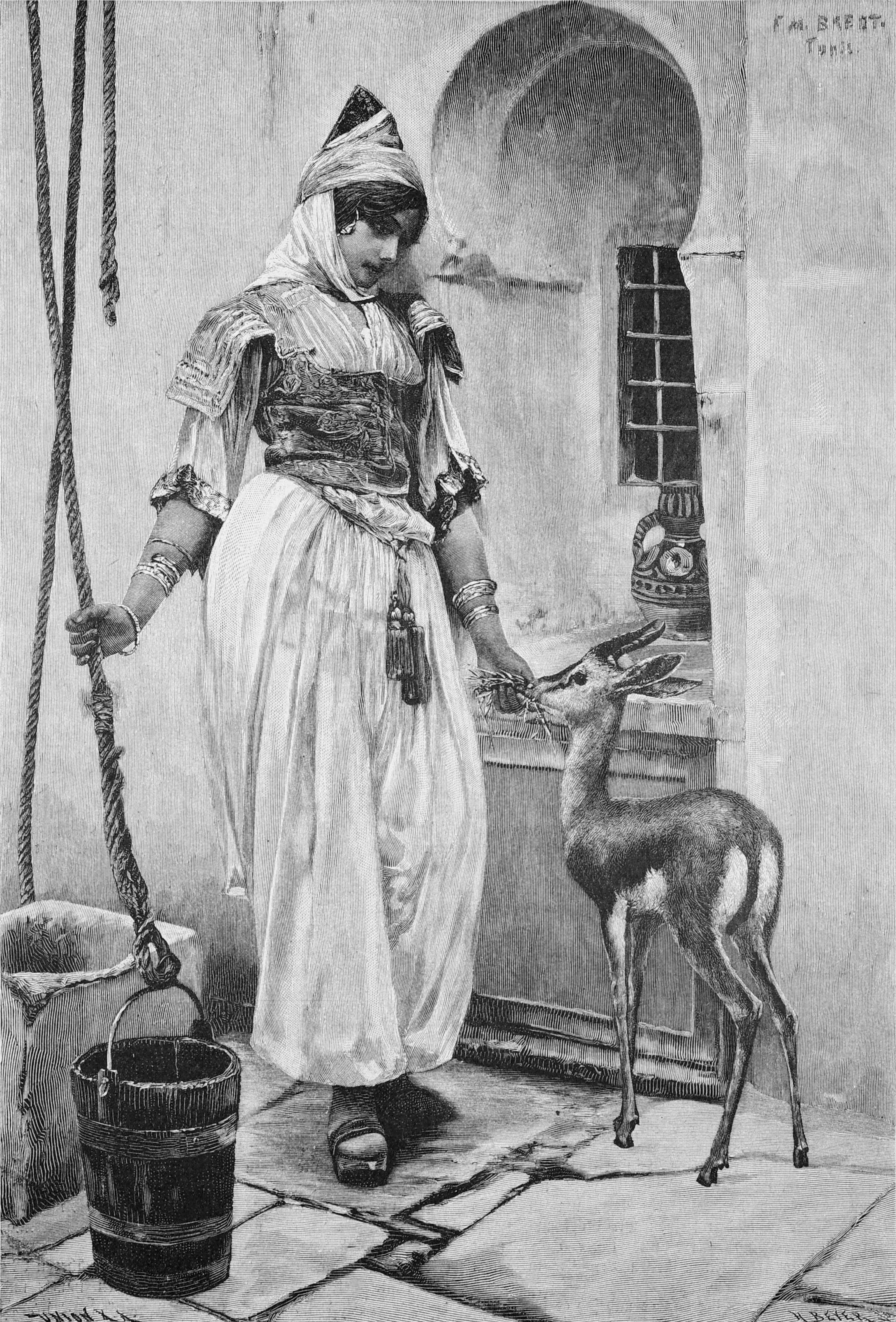 Ferdinand Max Bredt "Zwei Gazellen" (Tunis).